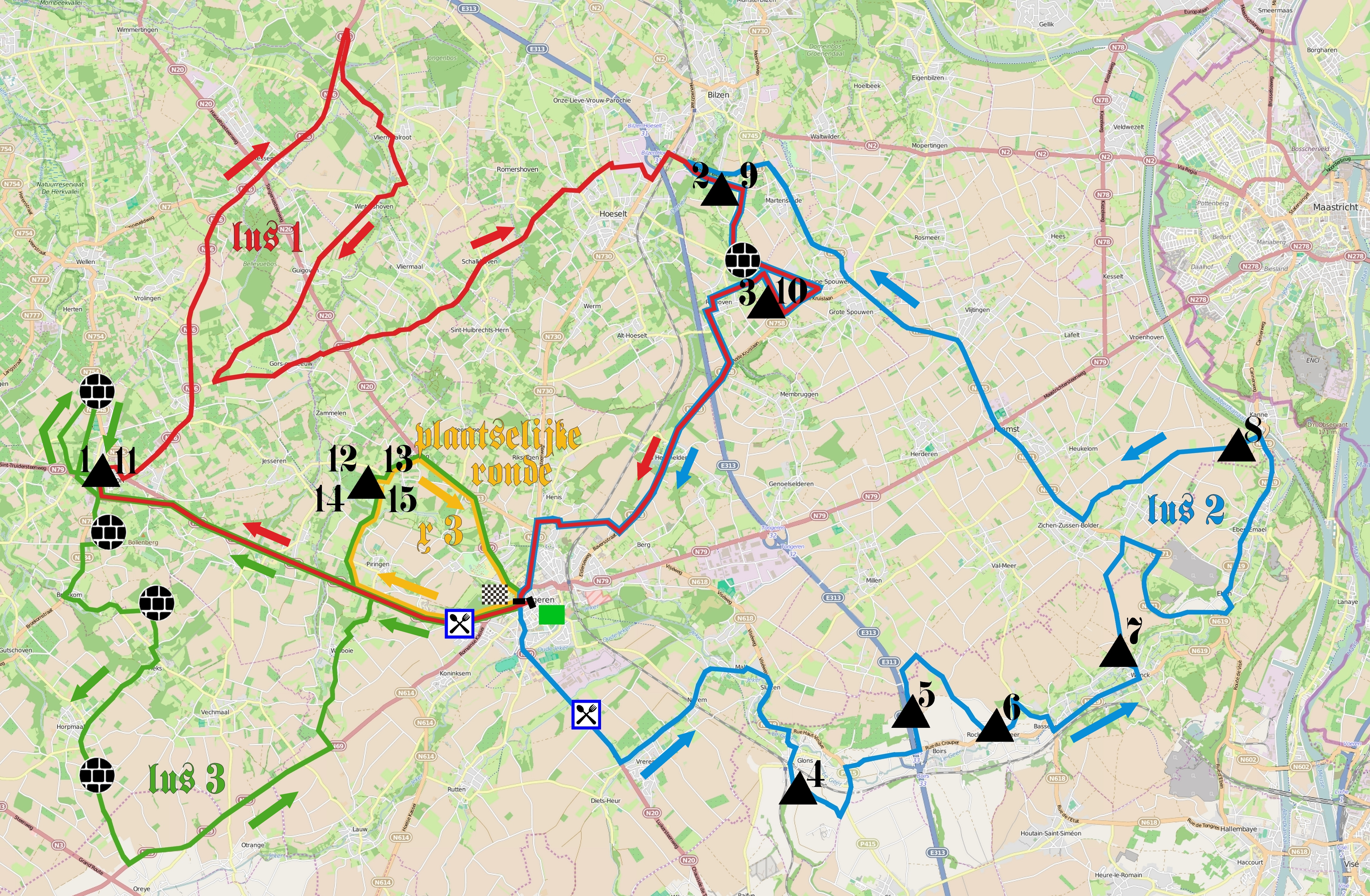 Reportage réalisé le dimanche 14 juin à l'occasion du départ et de l'arrivée du Tour du Limbourg 2015 à Tongres, Belgique.